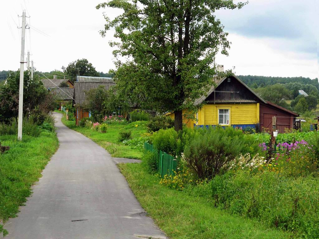 Беларуская (тарашкевіца): Язна